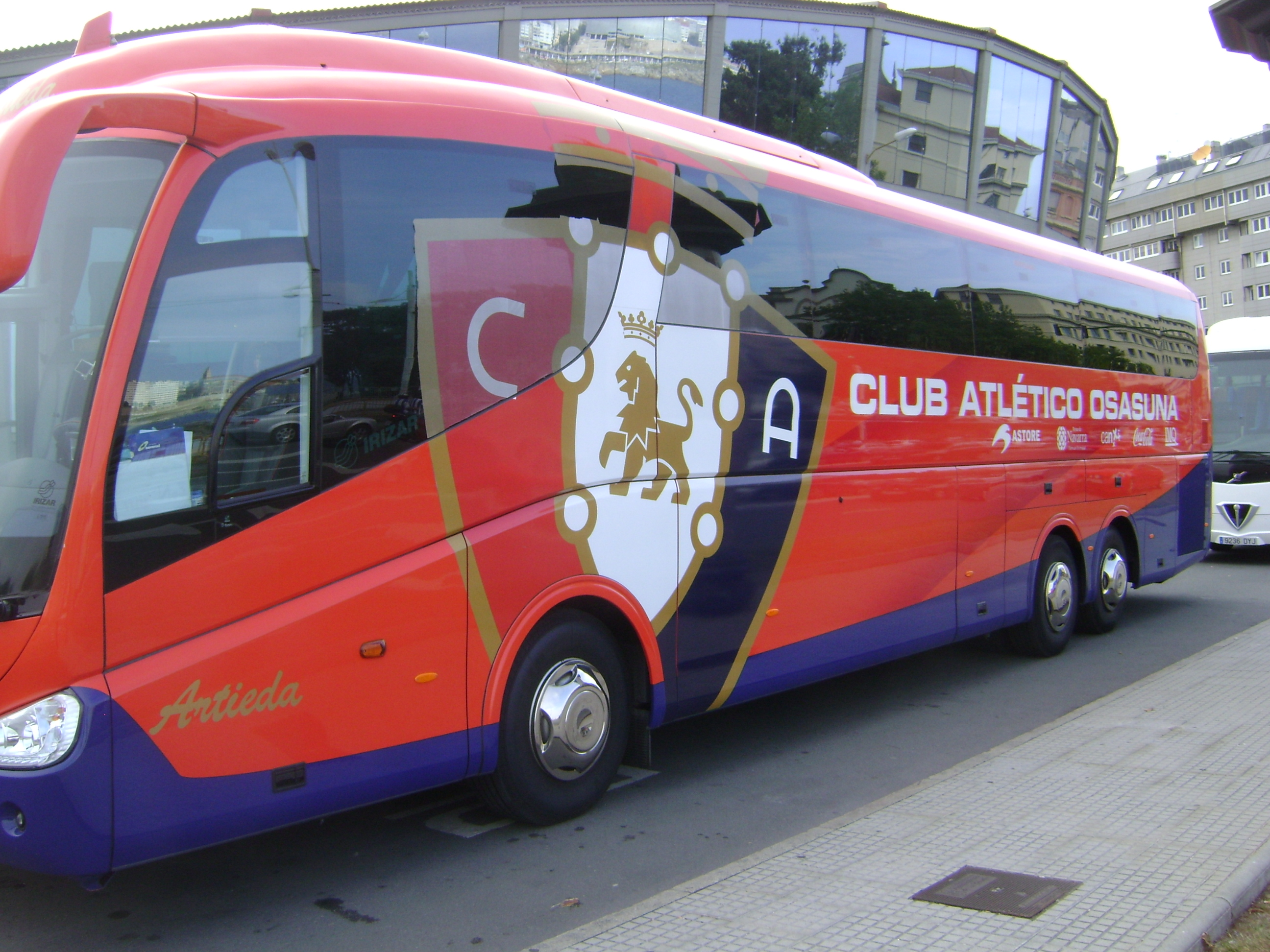 Autobús del CA Osasuna.